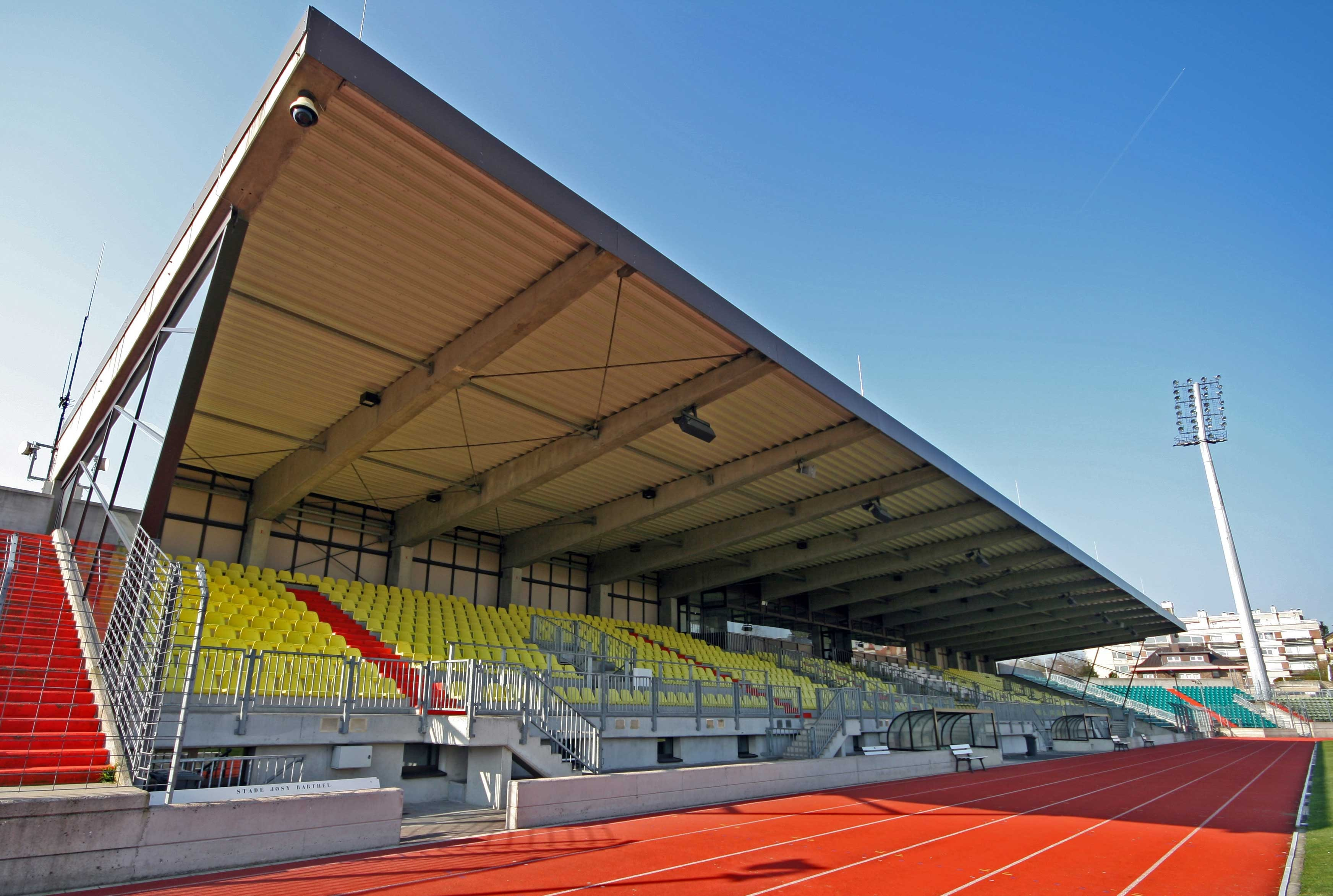 Stade Josy Barthel Tribün.